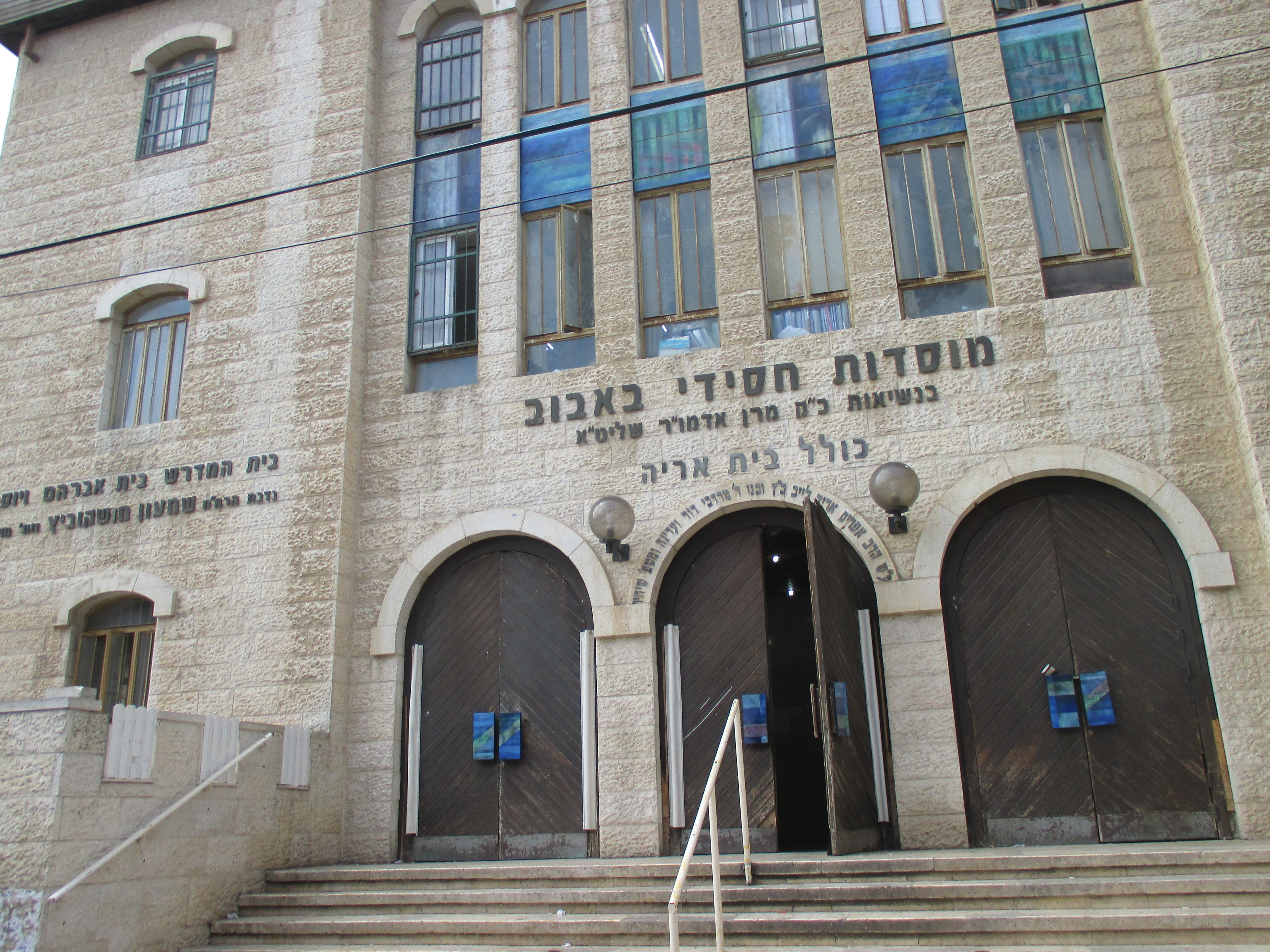 מוסדות חסידות באבוב ברחוב חגי בירושלים